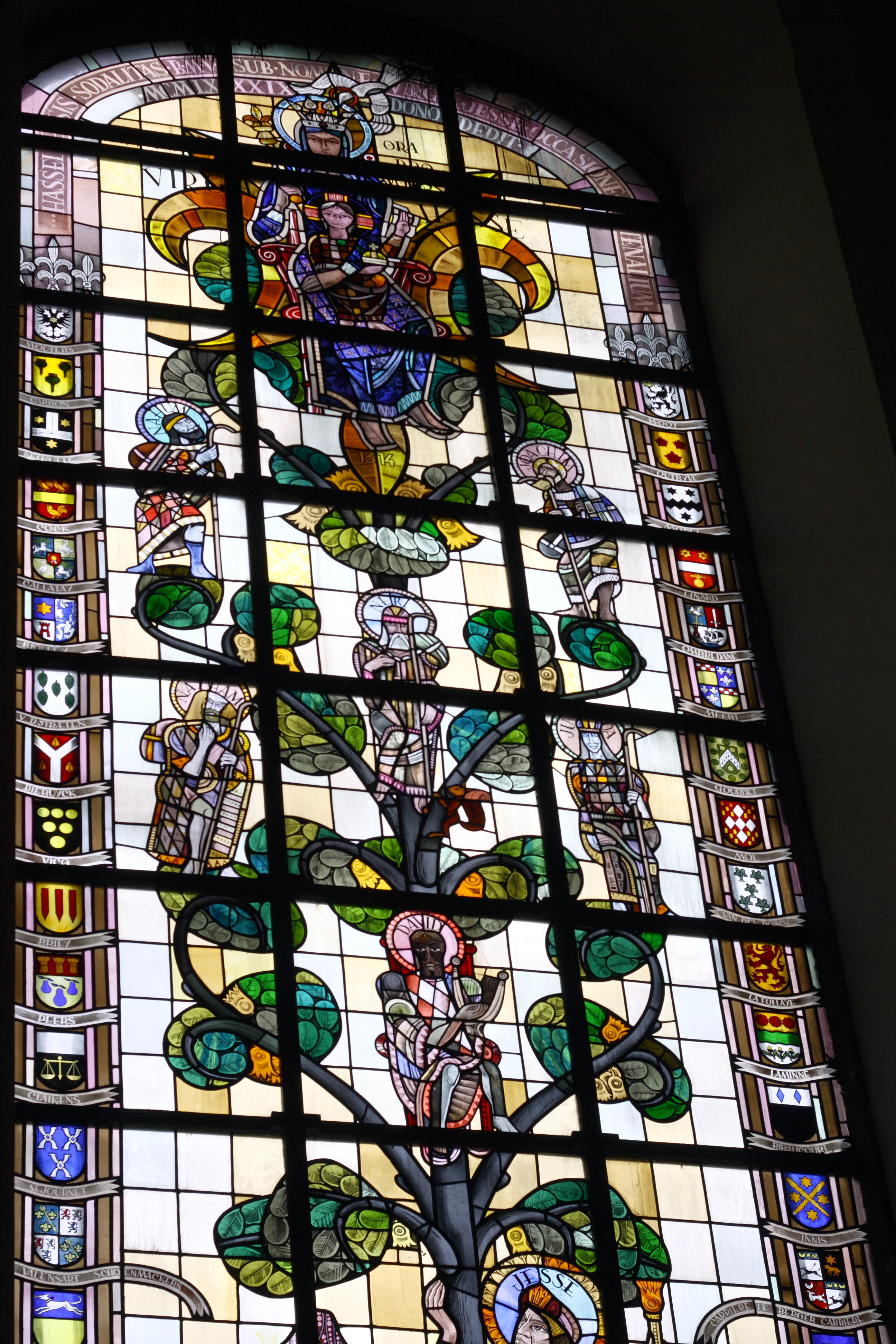 Bleiglasfenster in der Kirche Virga Jessebasiliek in Hasselt in der belgischen Limburg